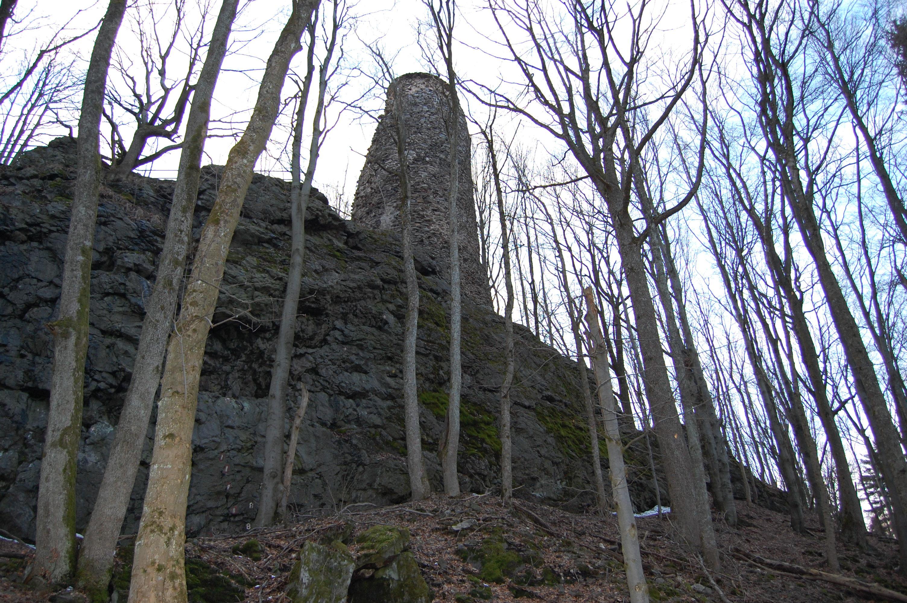 Turm der Burgruine Stadlern, Landkreis Schwandorf, Oberpfalz, Bayern (2011)